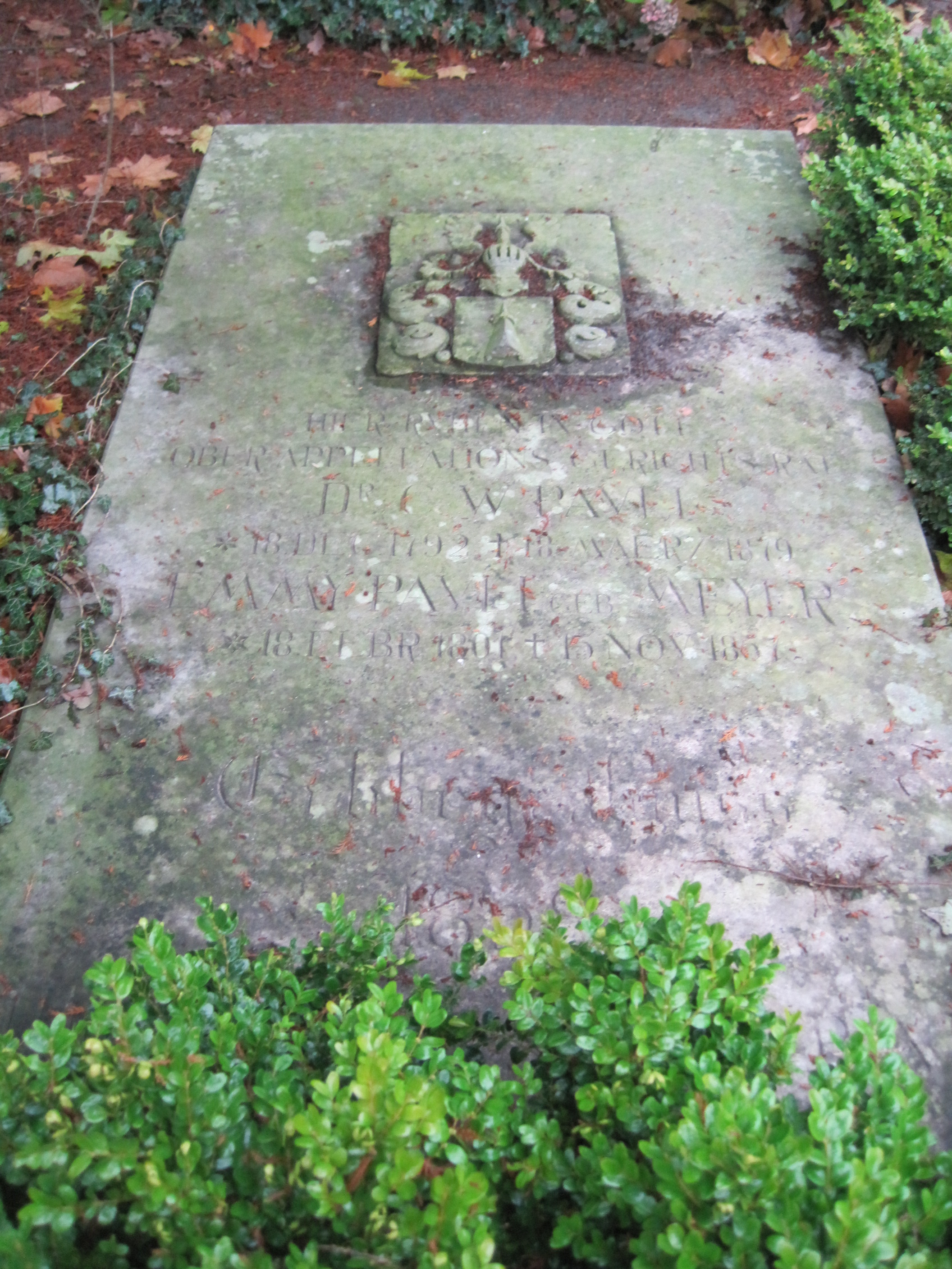 Erbegräbnis der Familie des Oberappellationsgerichtsrates Carl Wilhelm Pauli (1792-1879) auf dem Burgtorfriedhof.